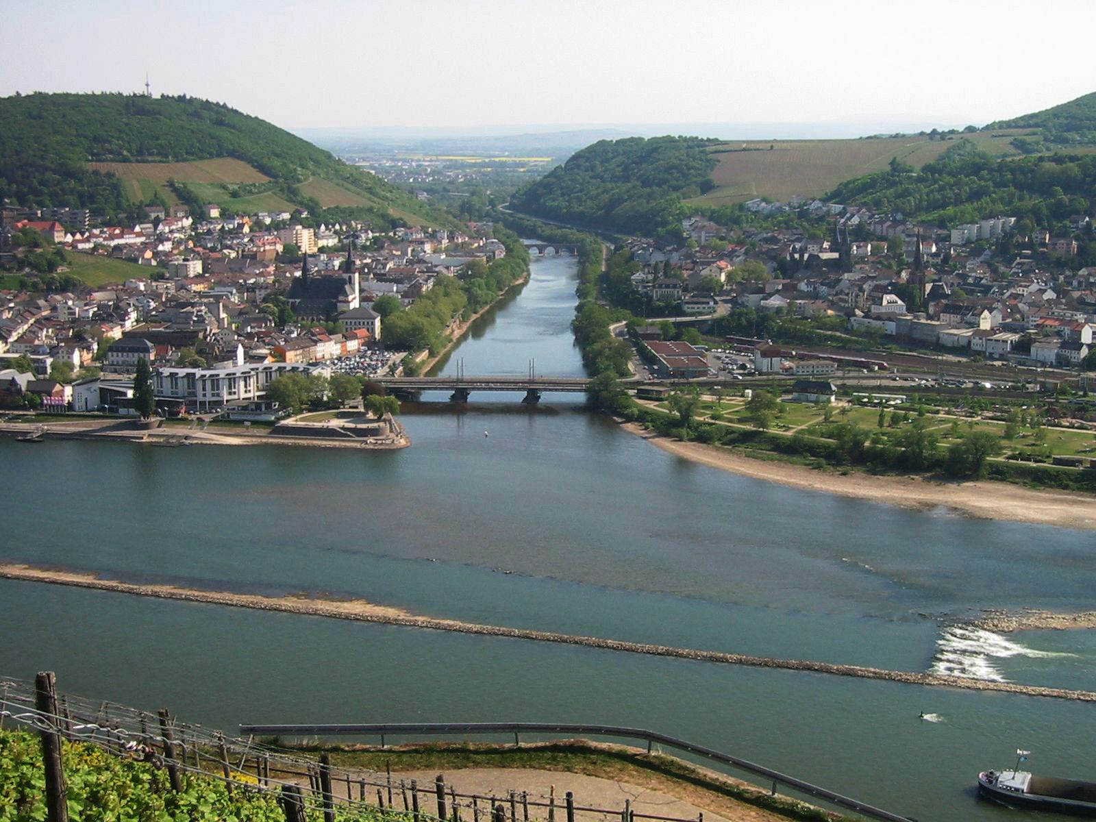 Die Mündung des linksrheinischen Flusses Nahe in den Rhein. Fotografiert vom Rüdesheimer Berg